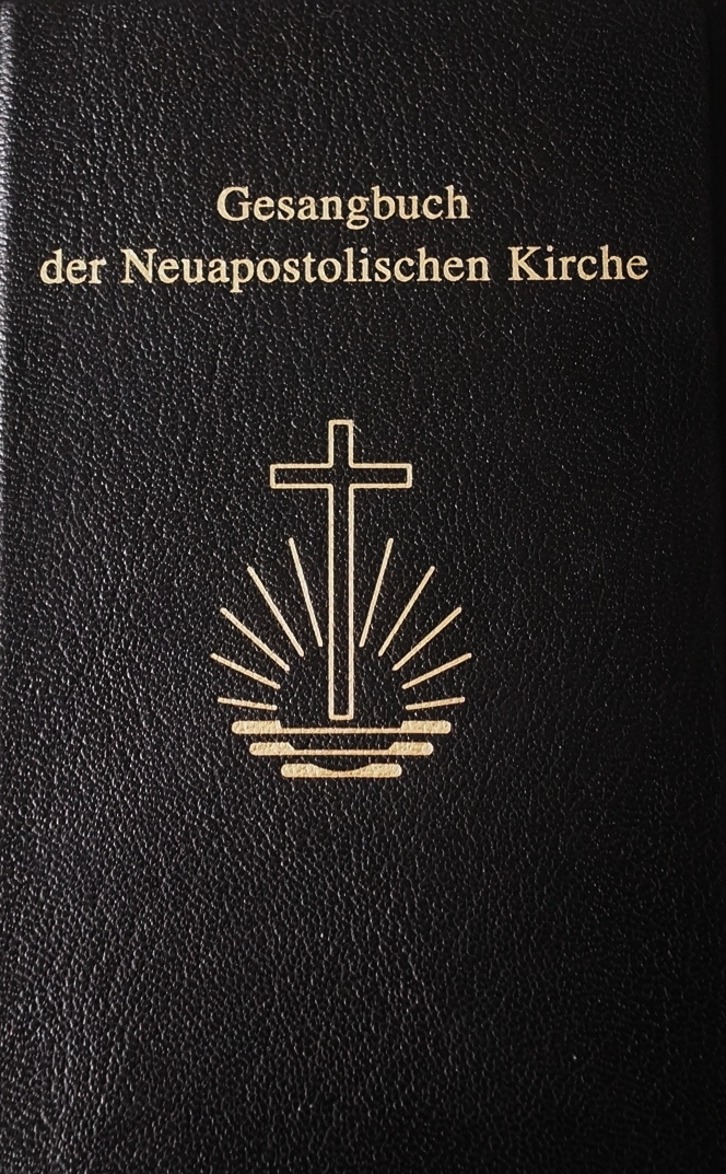 Gesangbuch der Neuap. Kirche